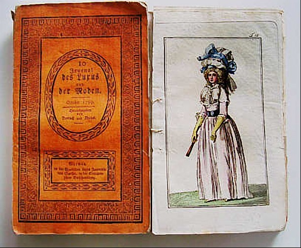 "Journal des Luxus und der Moden", edited by Friedrich Johann Justin Bertuch, Weimar, Germany. Cover and illustration.